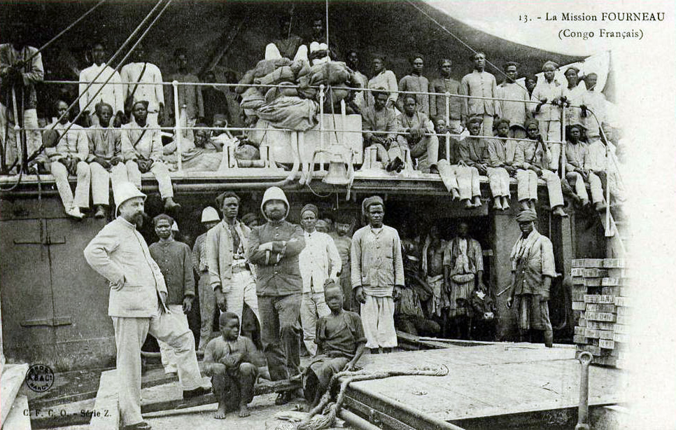 Mission Fourneau-Fondere